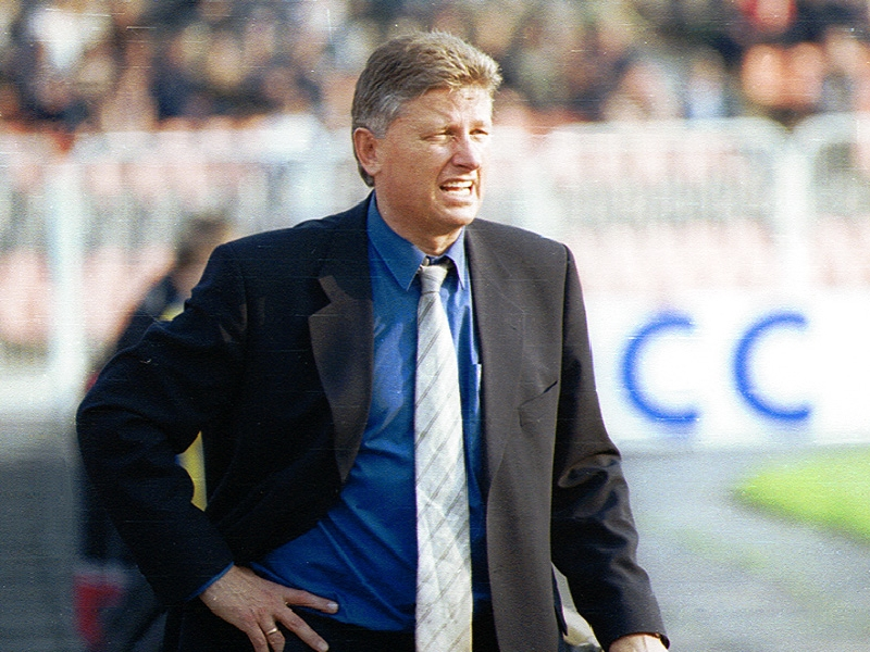 Фотография с диска Анастасии Федоренко «Донецк. Увидеть и полюбить». ФК «Шахтёр» Донецк